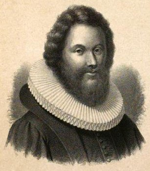 Norsk (bokmål): Kjeld Stub (1607–1663)